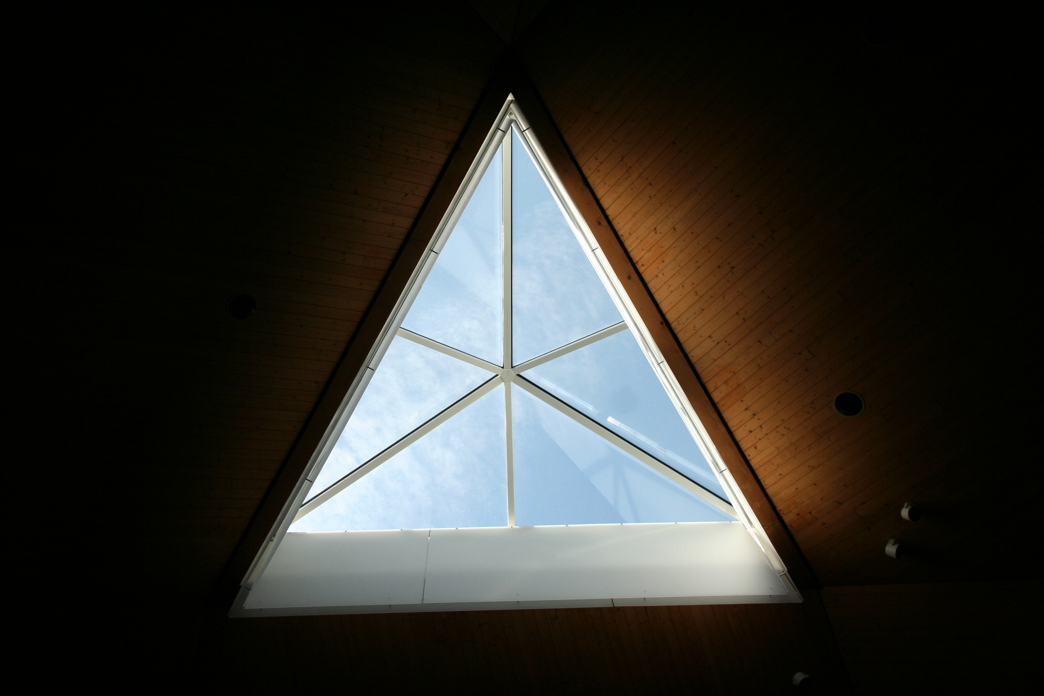 Römisch-katholische Kirche St. Michael Uitikon